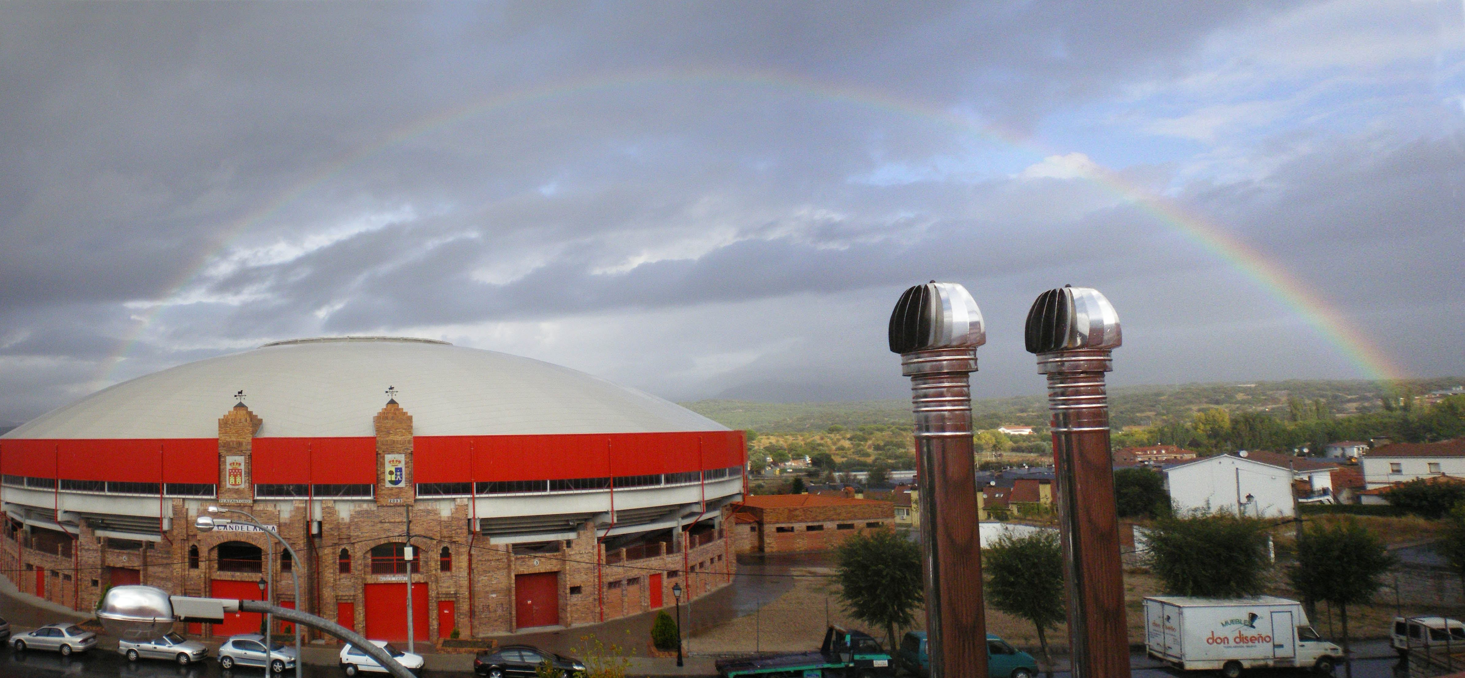 Instantánea de un arcoiris sobre la Plaza de Toros de Valdemorillo, Madrid en 2008